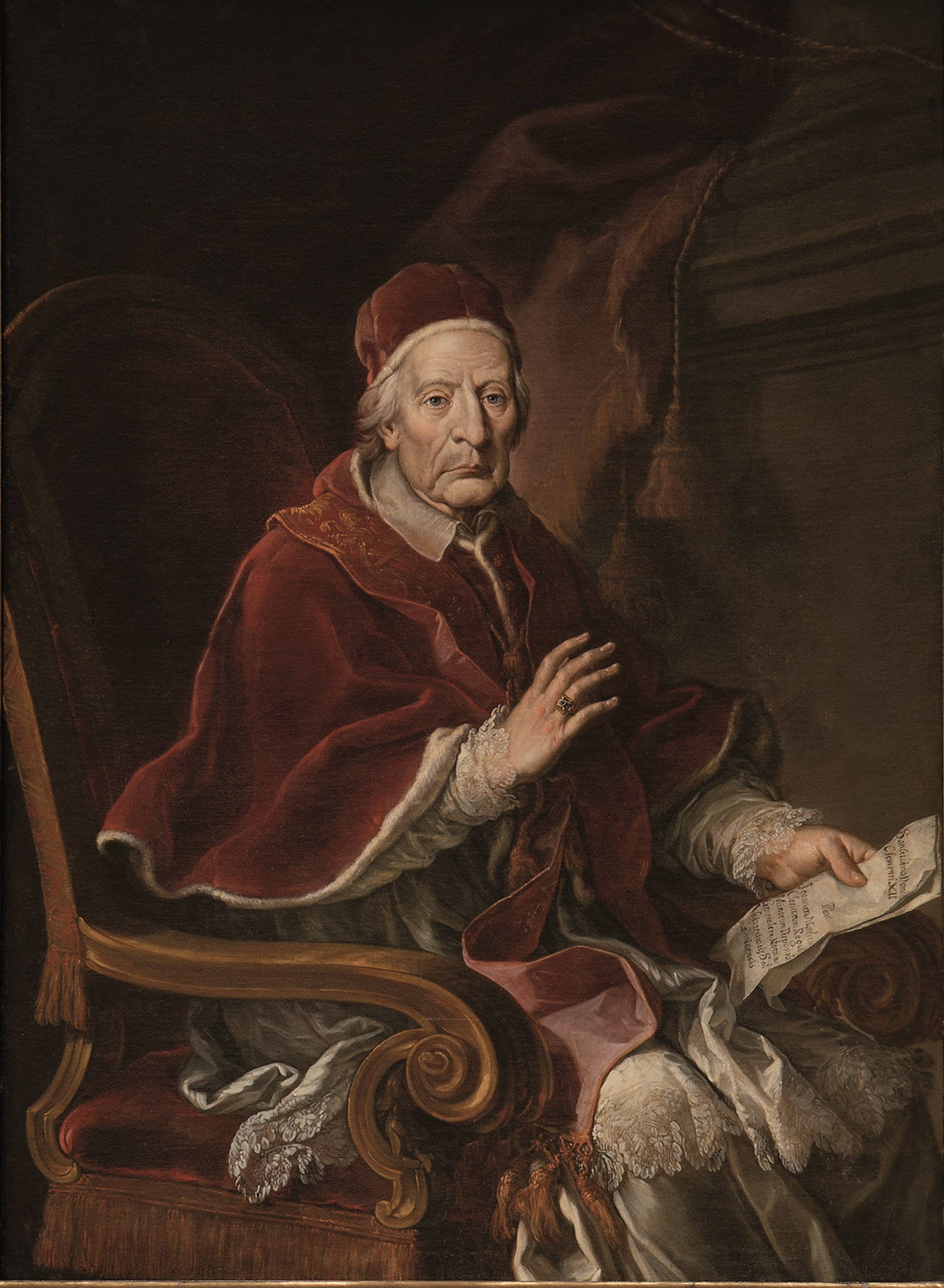 Retrato del papa Clemente XII (1652-1740).